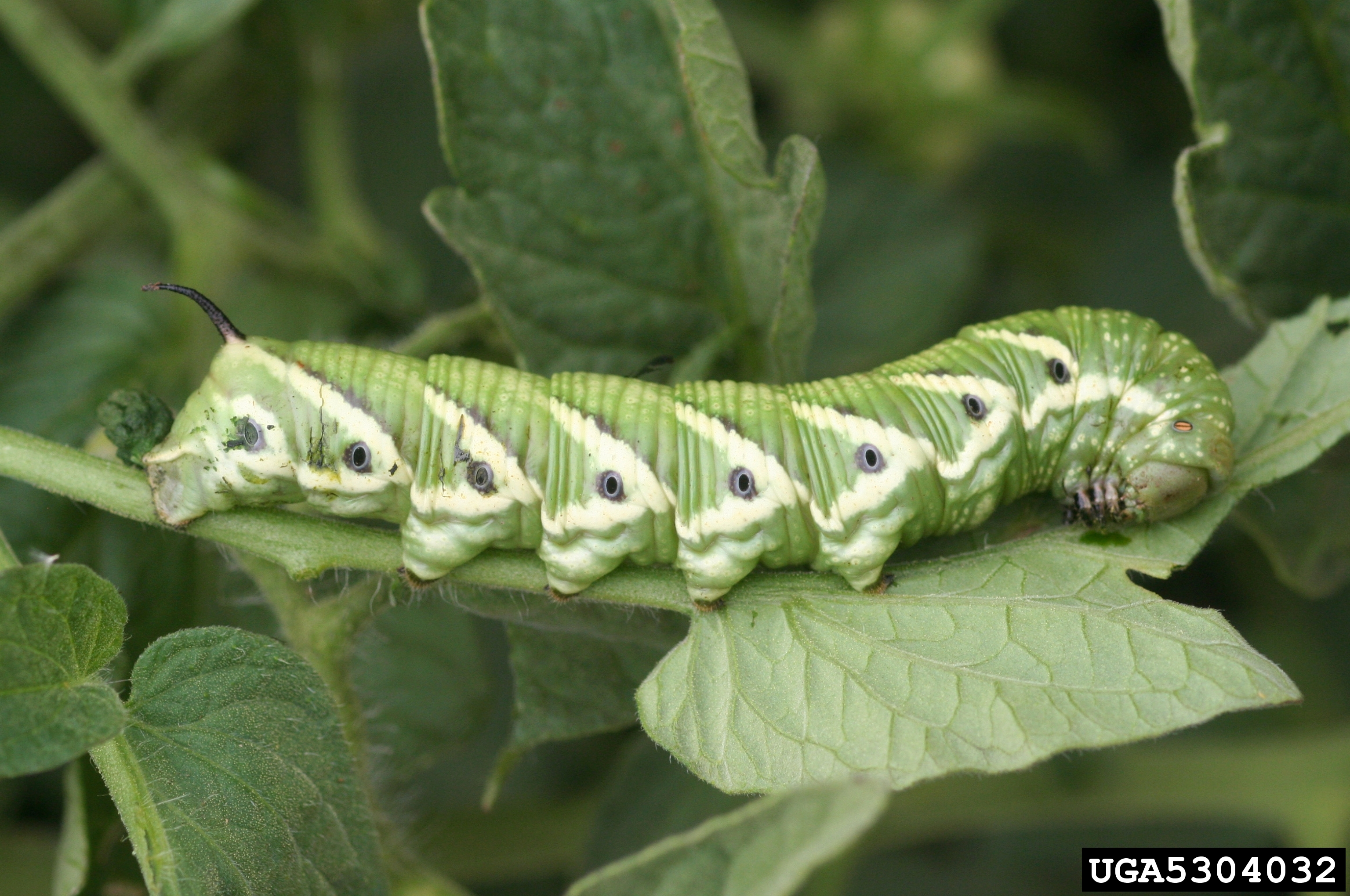 Manduca quinquemaculata, larva